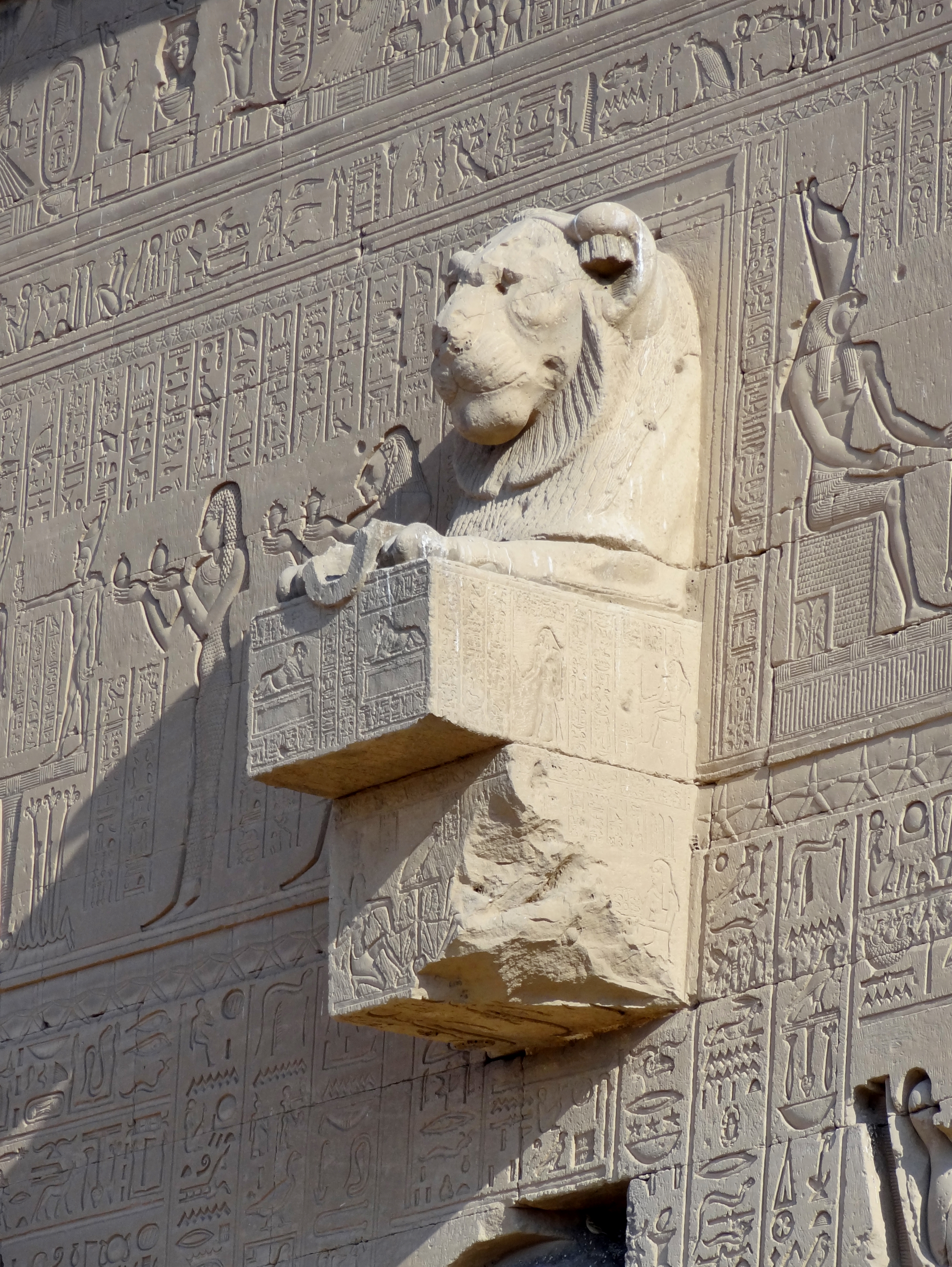 Löwenköpfiger Wasserspeier an der Südseite des Hathor-Tempels von Dendera, Ägypten